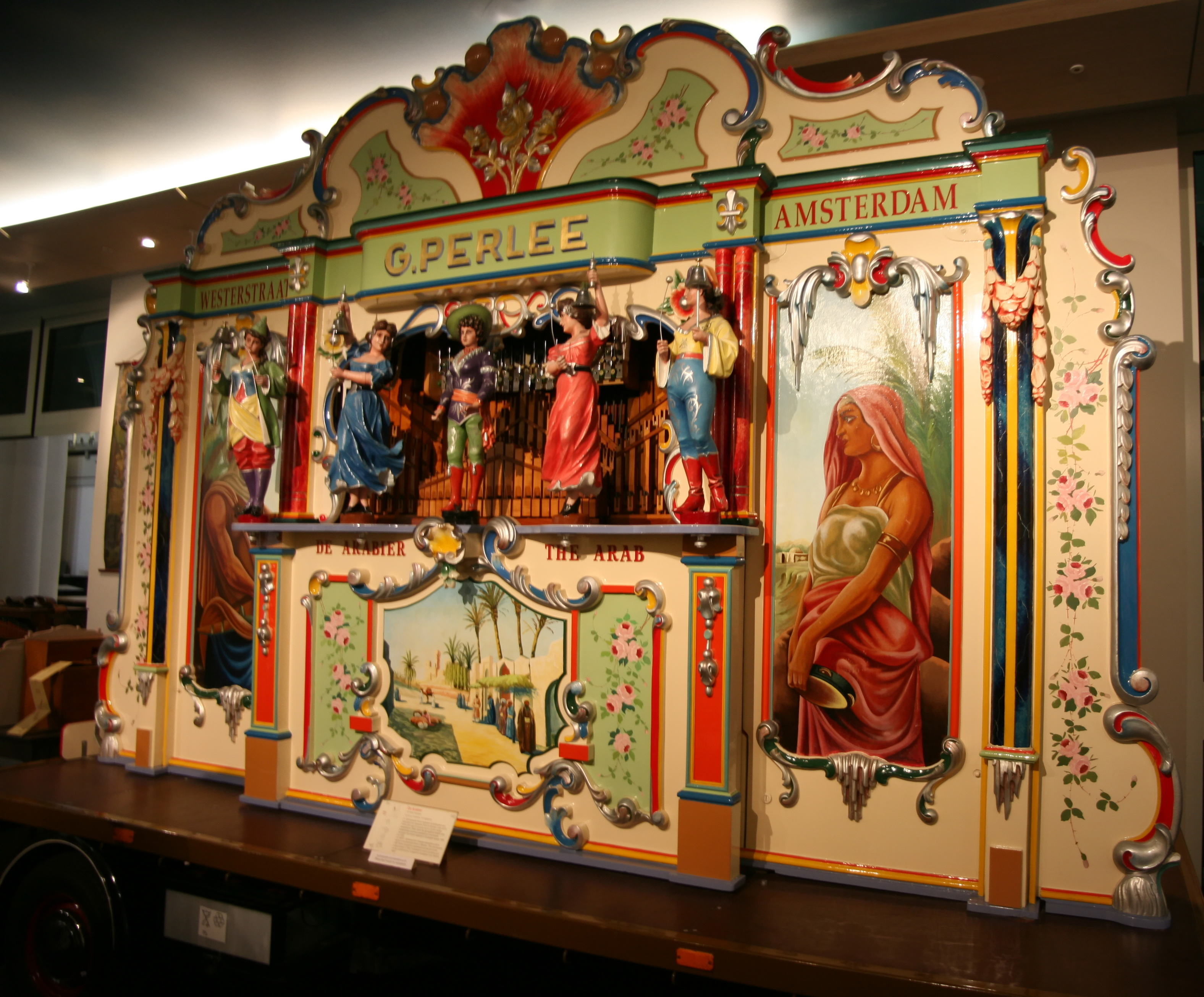 museum speelklok tot pierement (205)